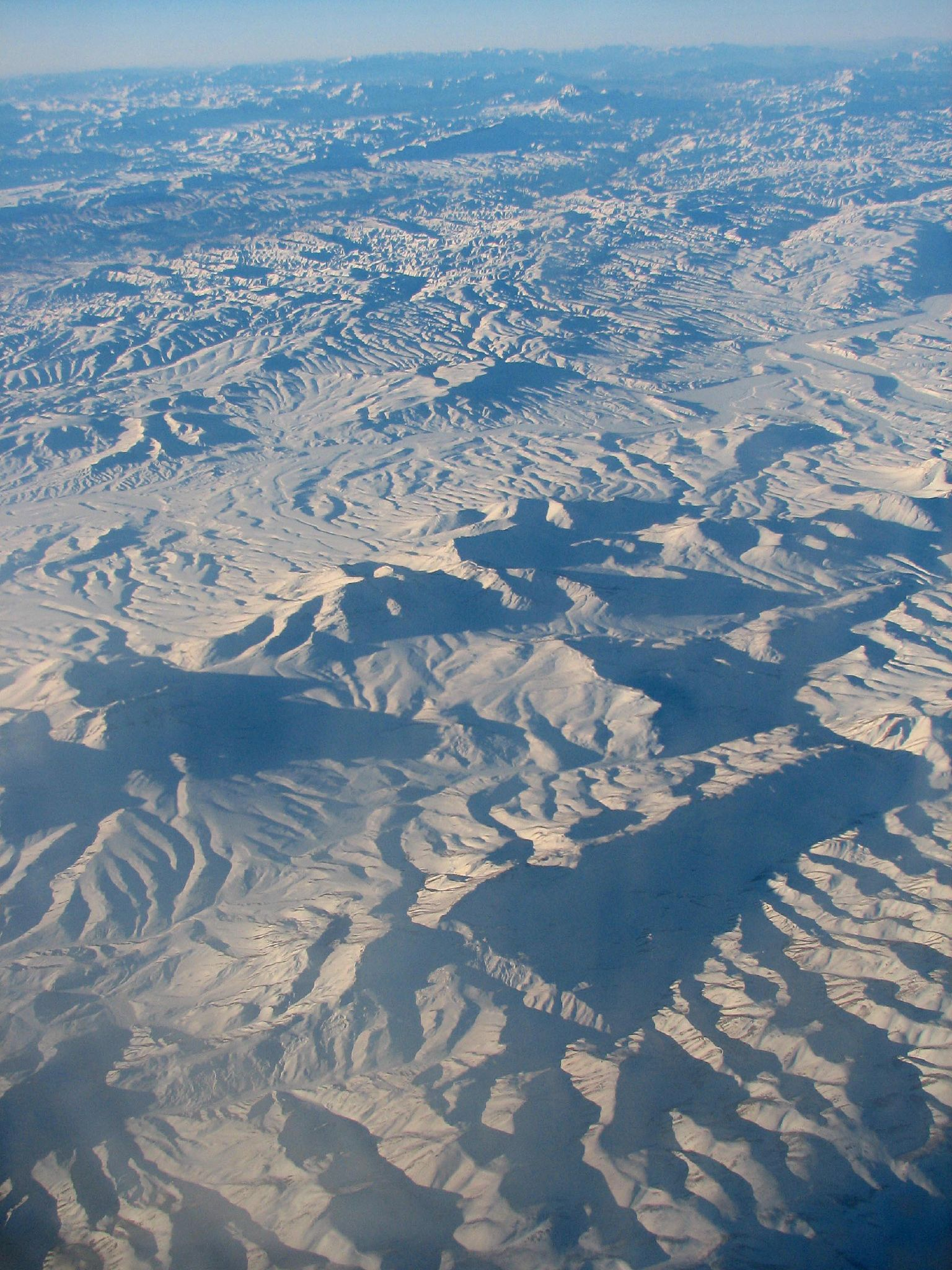 Pakistan, Central Makran Range 01